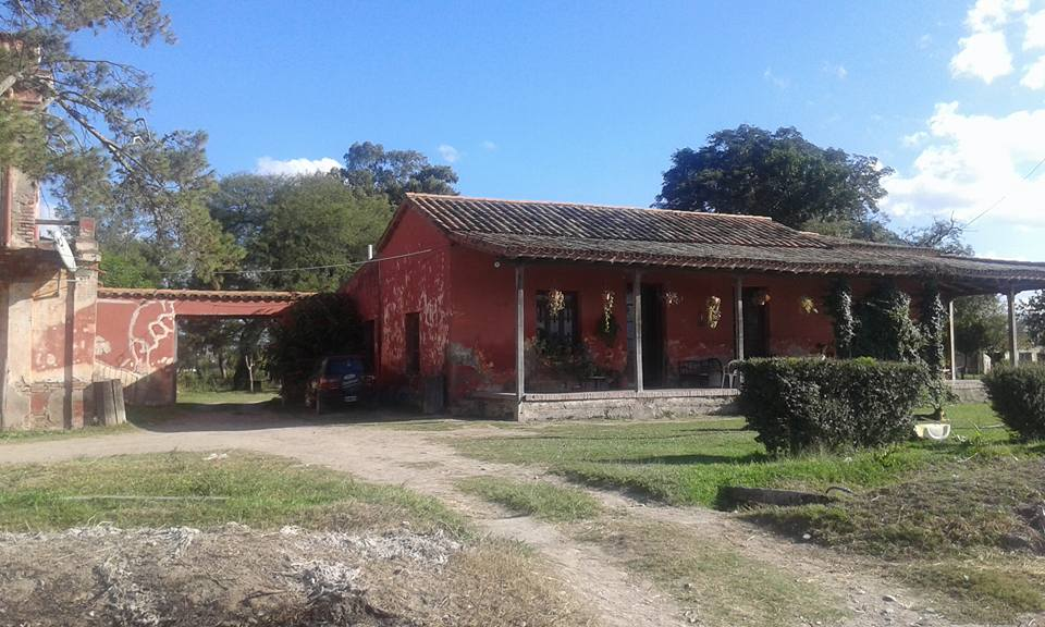 Sala Historica de la Finca el Carmen de Guemes